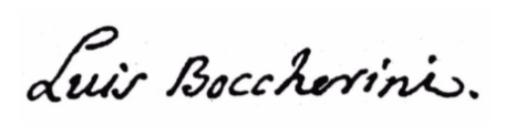 Signature de Boccherini en Espagne.